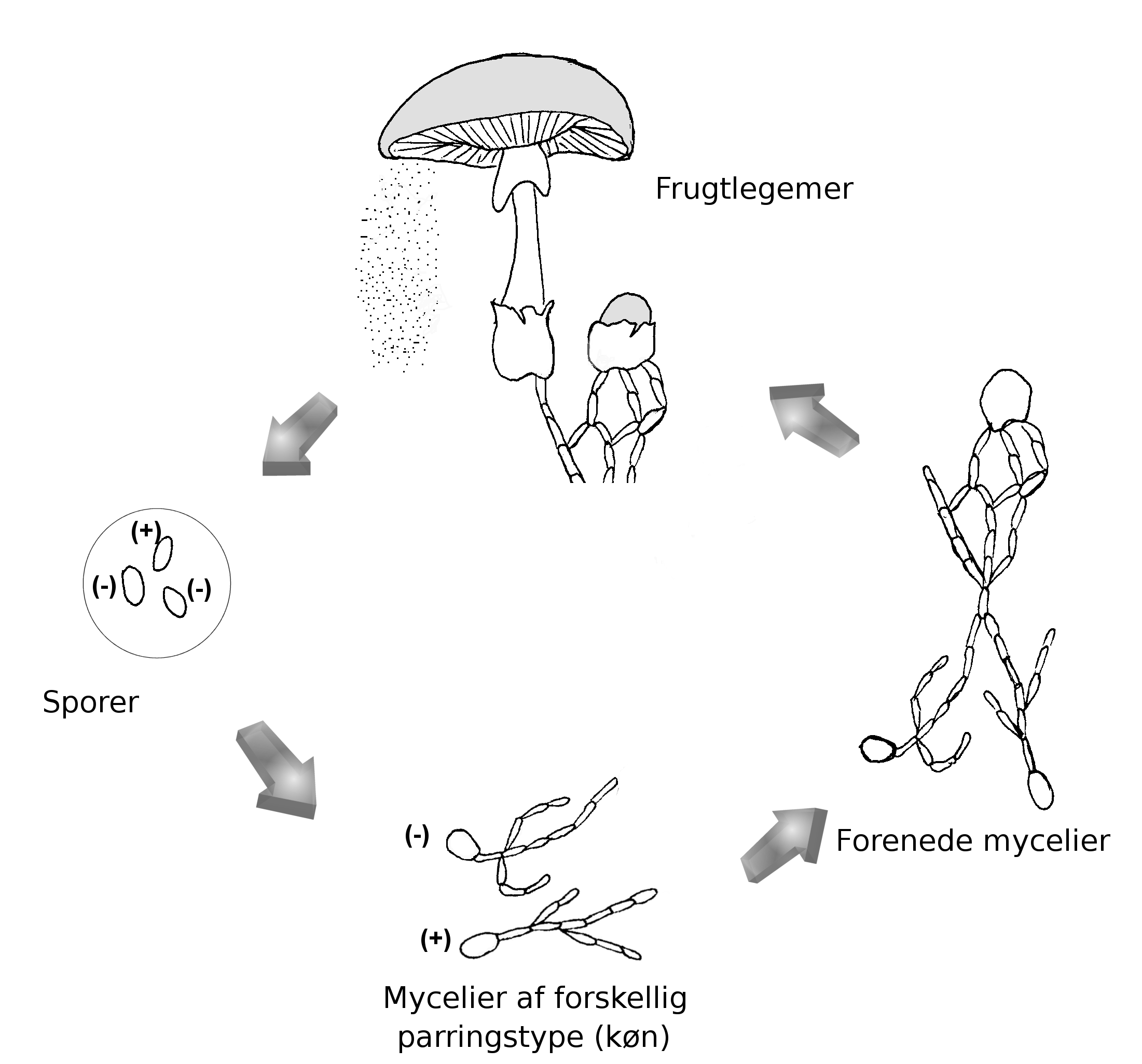 Livscyklus for en basidiesvamp